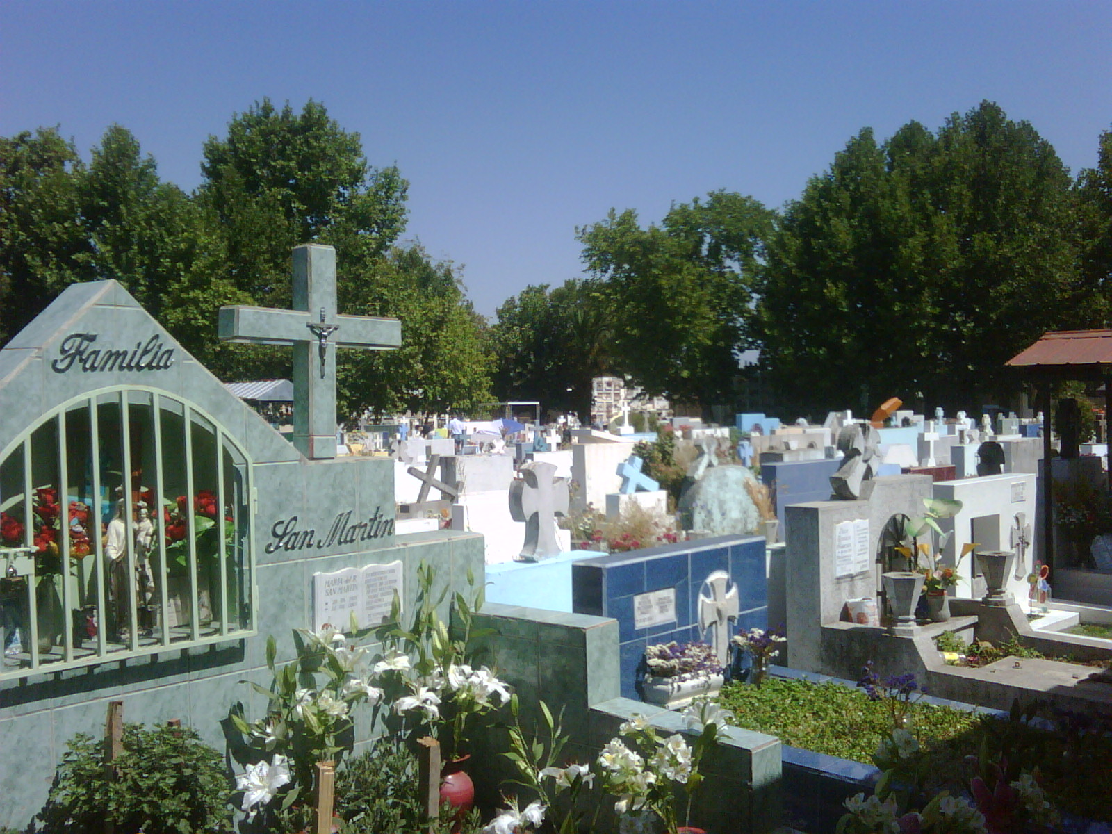 Uno de los patios del Cementerio Católico de Rengo